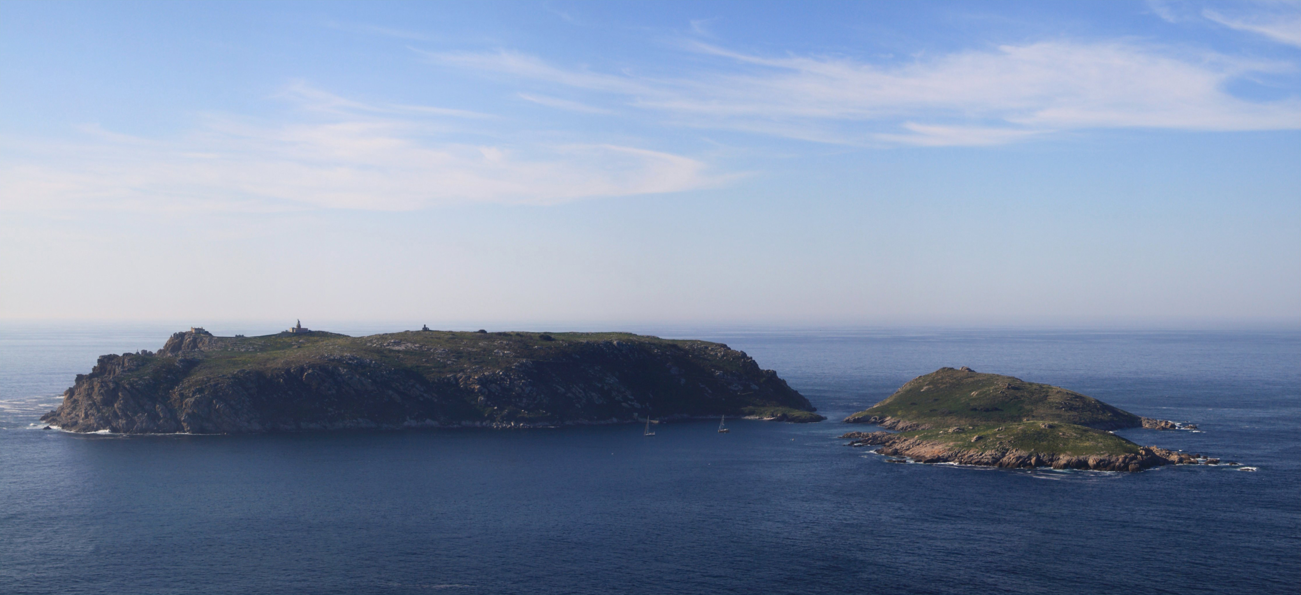 Illas Sisargas